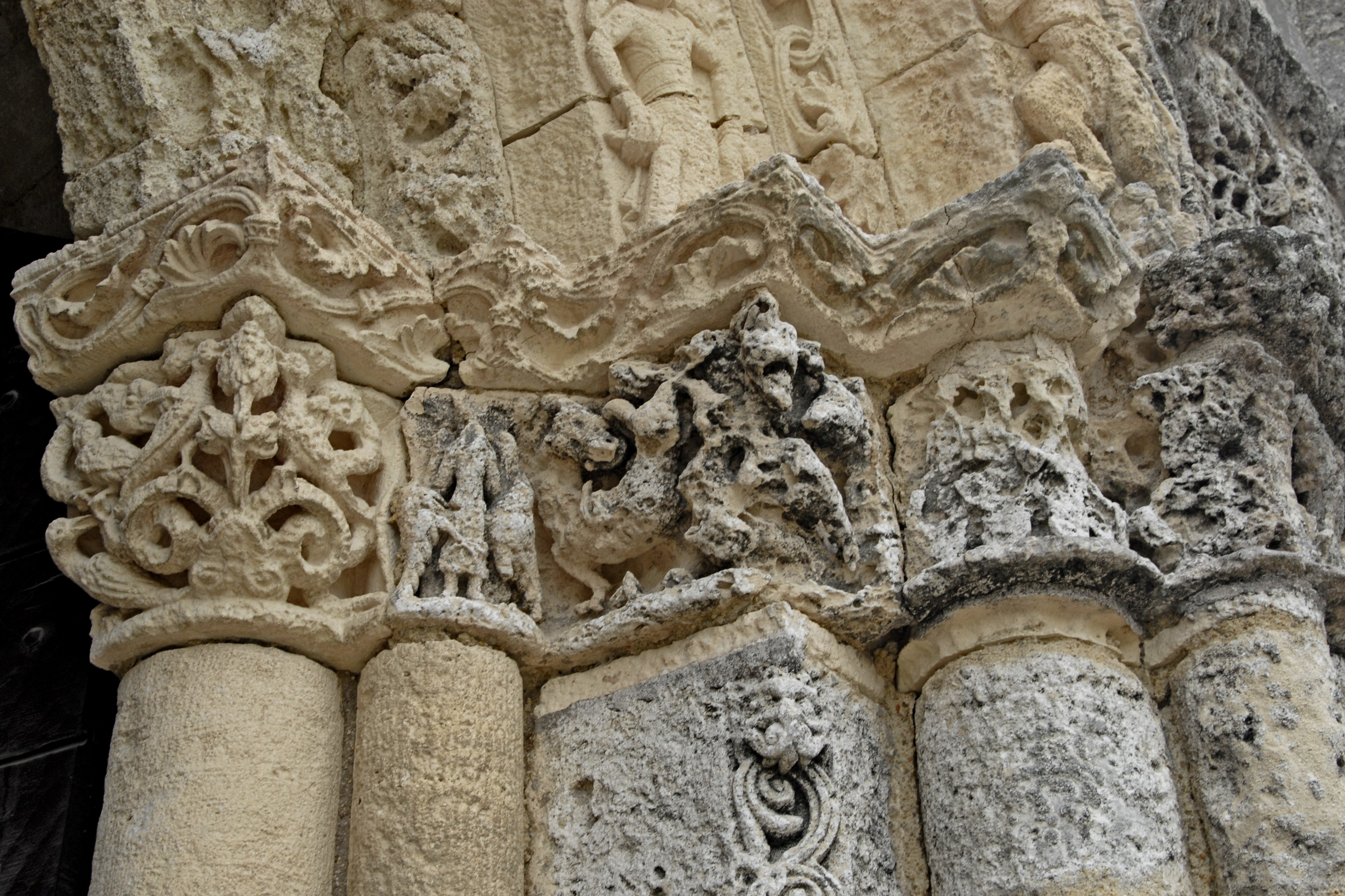 Sainte-Radegonde-Talmont-sur-Gironde, Kapitelle Hauptportal rechts